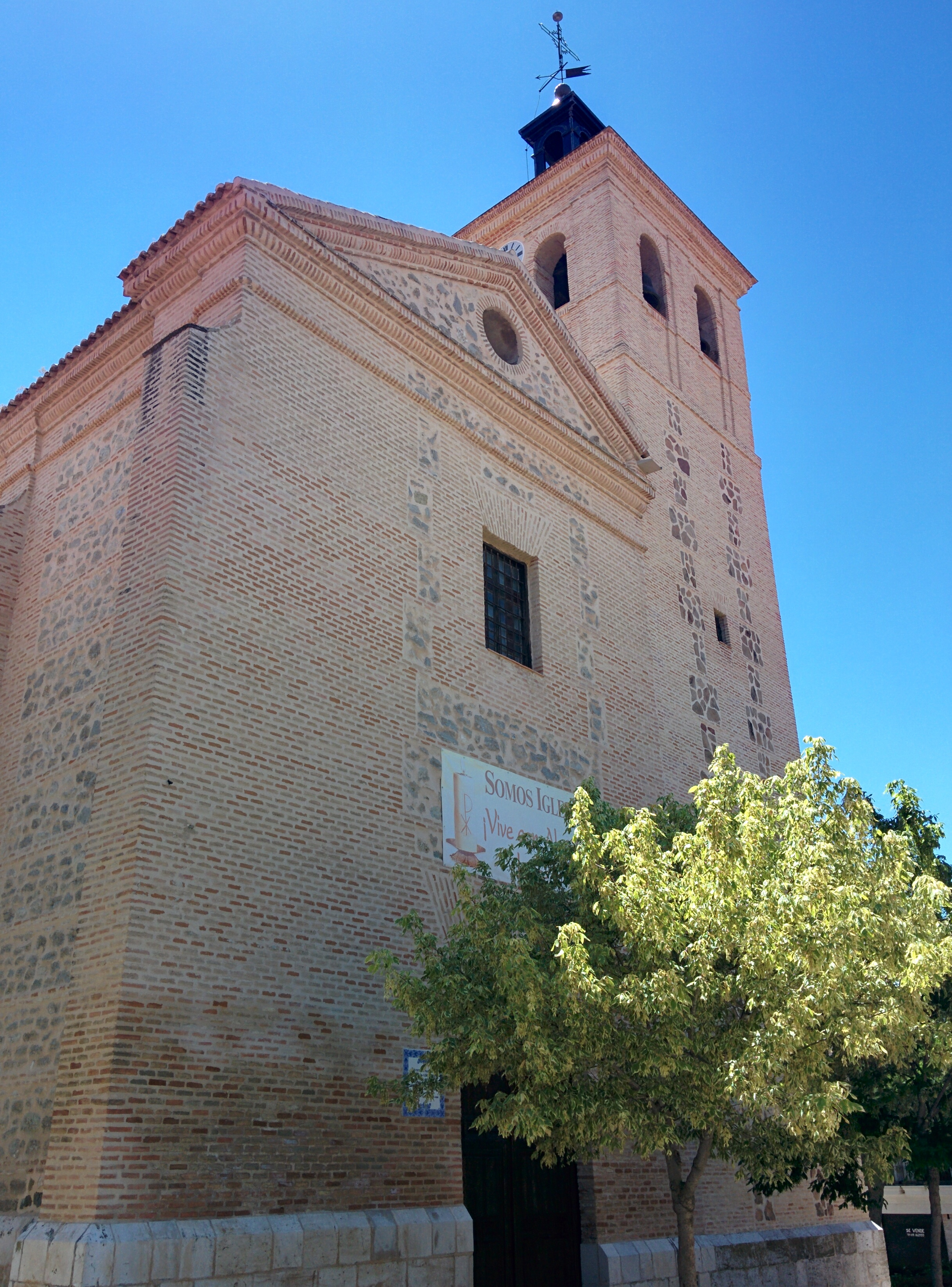 Iglesia de Nuestra Señora de la Asunción, en Alameda de la Sagra (Toledo, España).